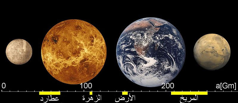 مقارنة احجام الكواكب الأرضيّة في المجموعة الشمسية